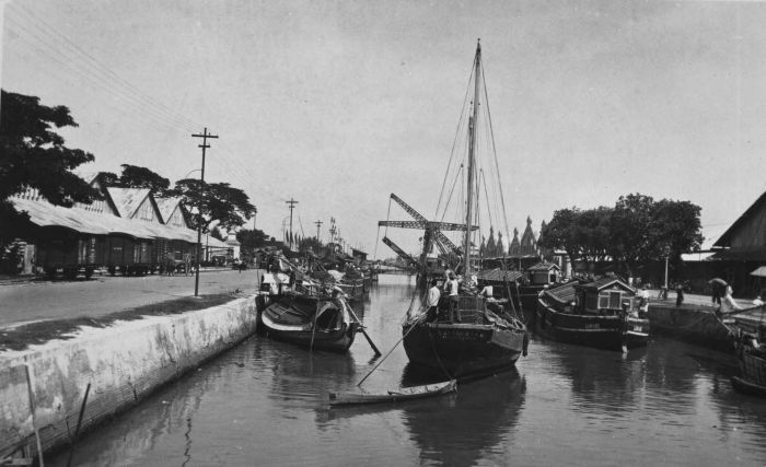 Foto. Kali Baru